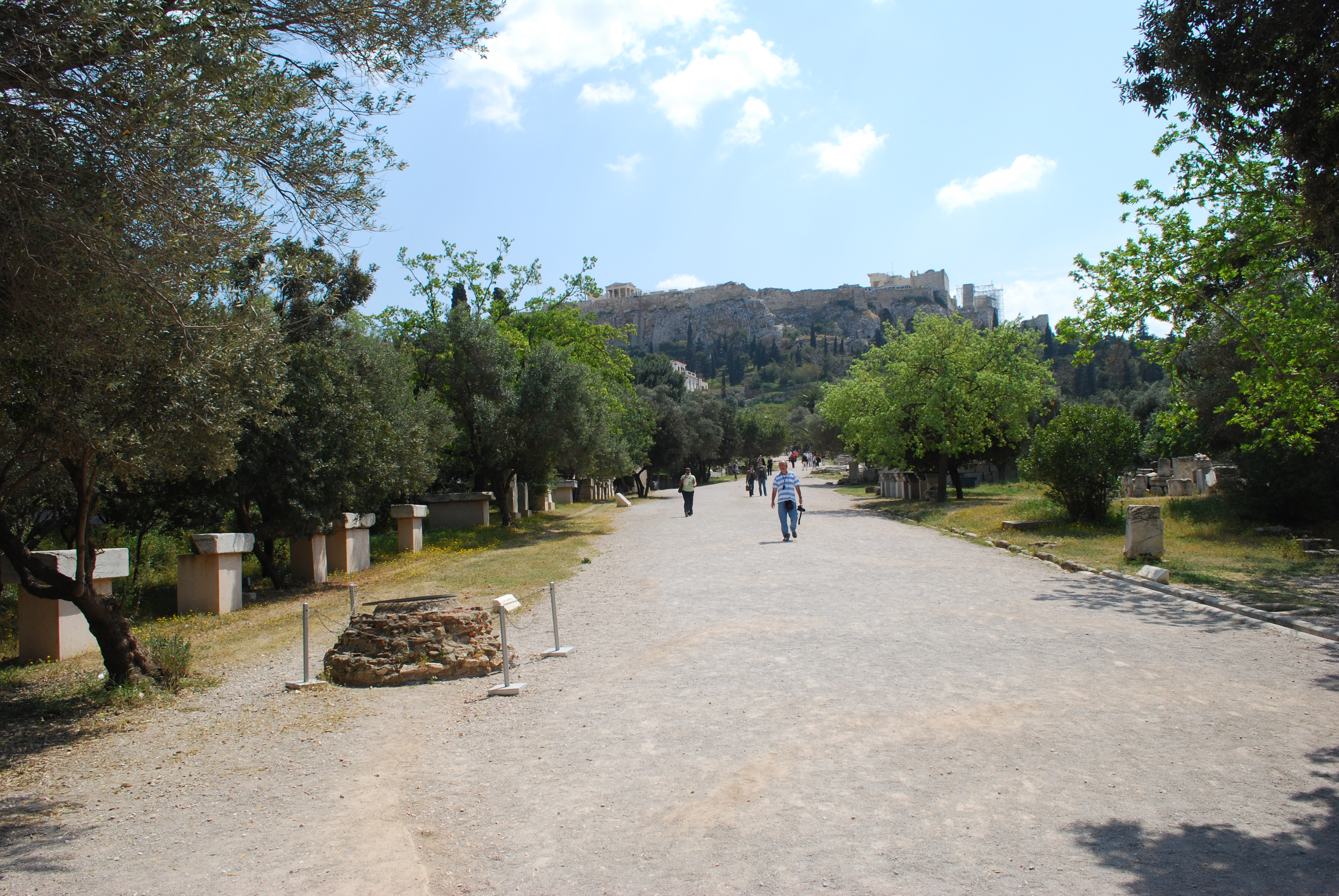 Le Chemin des Panathénées sur l'agora d'Athènes.